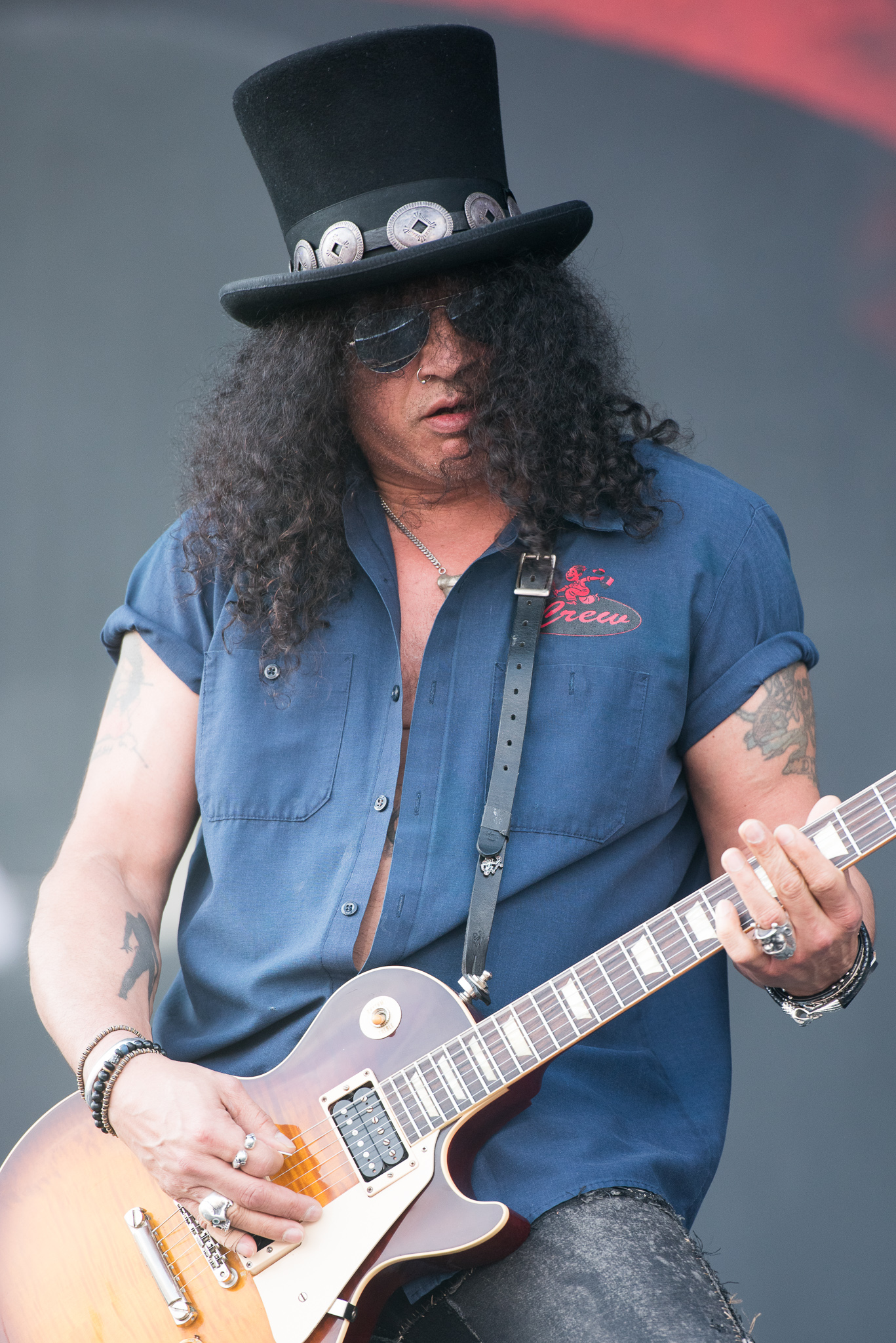 ARGO-Konzerte,Festival,Konzert,Livekonzert,Livemusik,Musik,RiP,Rock im Park 2015,Saul Hudson,Seat Zeppelin Stage,Slash feat. Myles Kennedy & The Conspirators